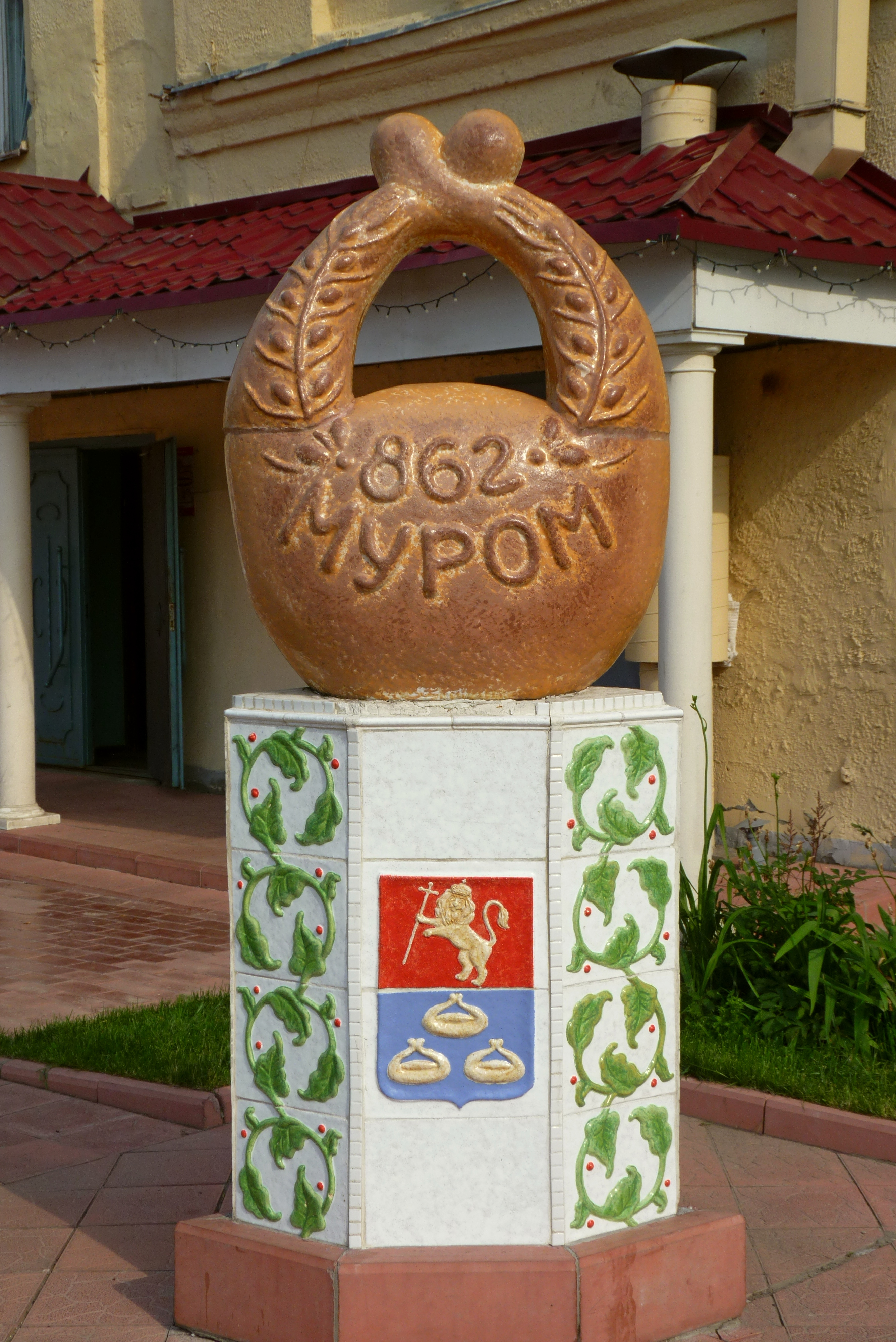 Муром ул.Ленина Памятник муромскому калачу